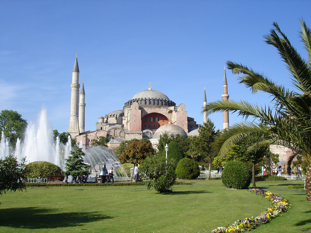 Esterno di Santa Sofia, ad Istanbul. Foto di: Giovanni Dall'Orto, 24-5-2006.